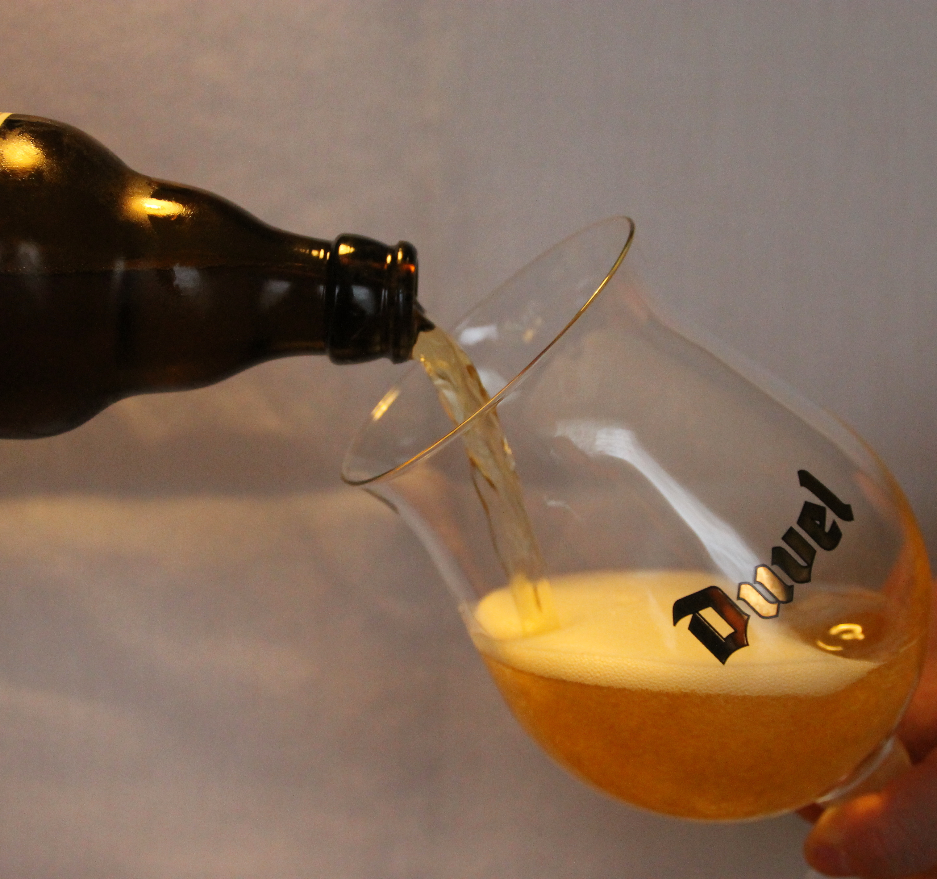 Foto met beweging